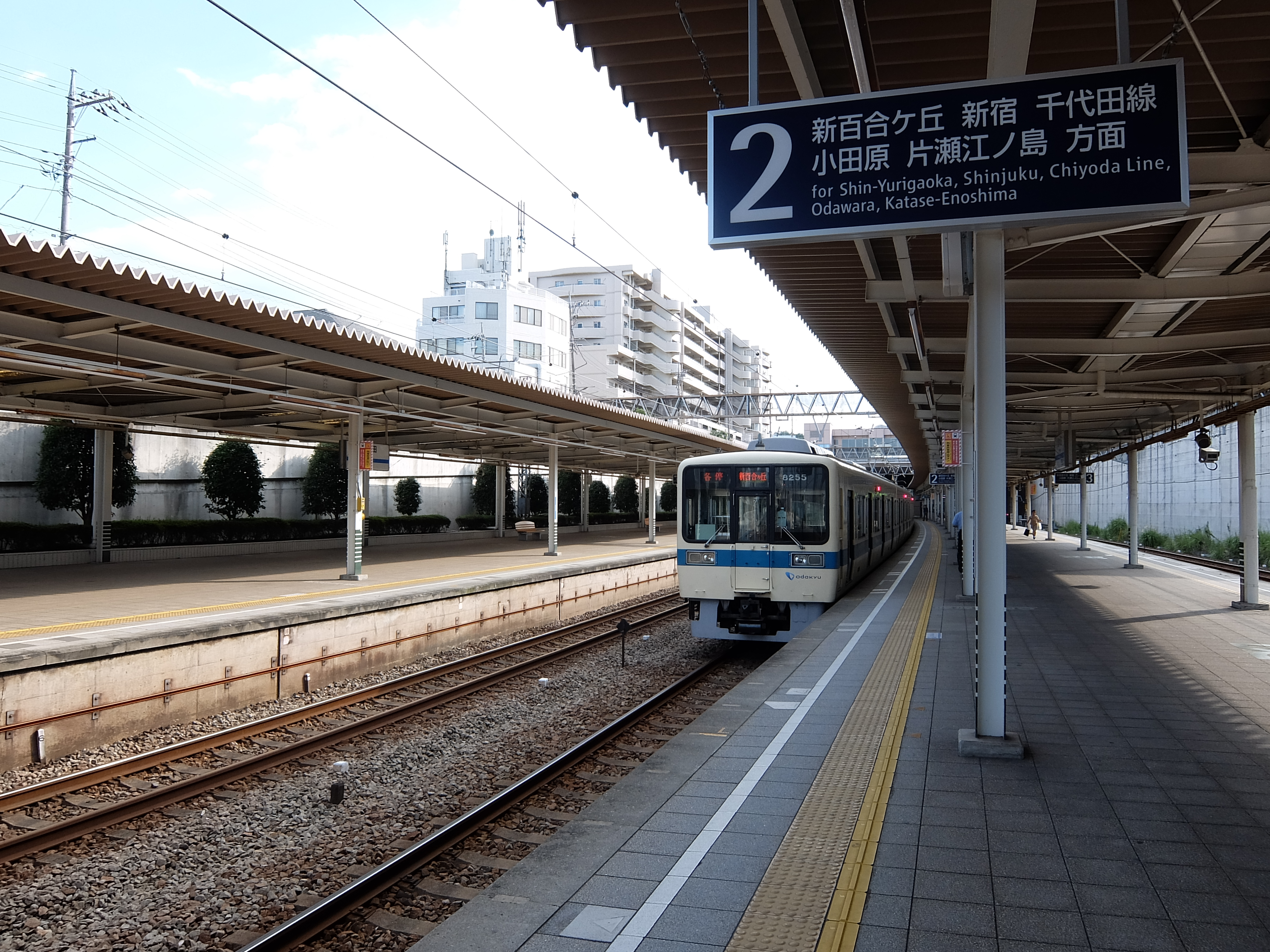 小田急多摩線 唐木田駅 ホーム端より駅全体を望む